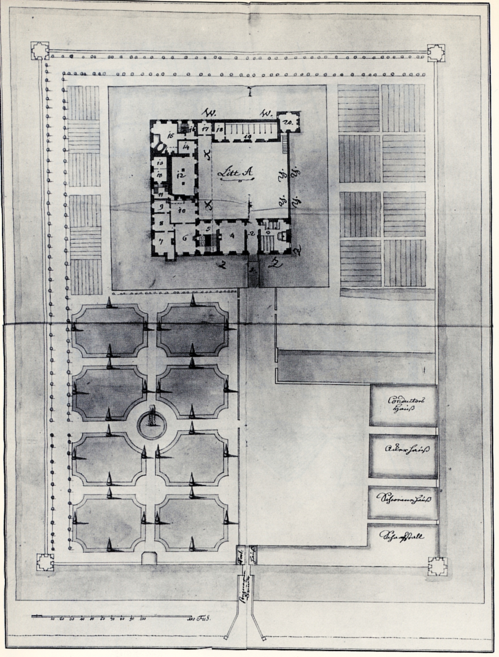 Übersichtsplan des Schlosses Merlsheim